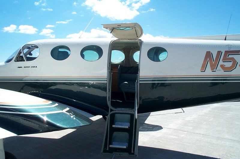 Cessna 340A